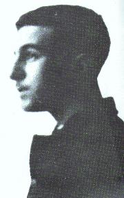 Fernando Pessoa na juventude.